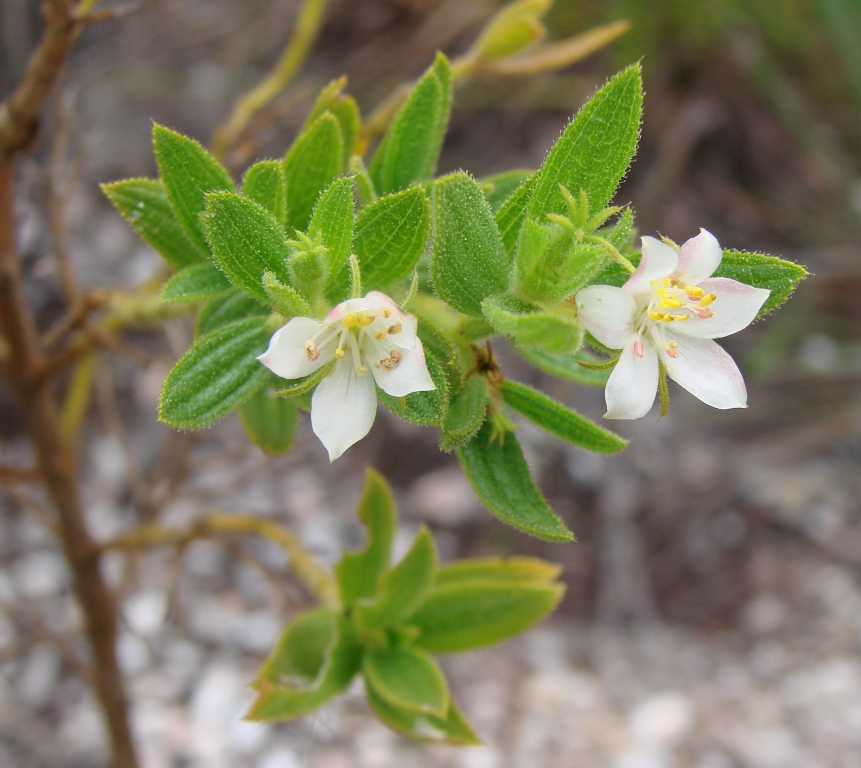 Trembleya phlogiformis DC. - MELASTOMATACEAE - Parque Estadual da Serra dos Pirineus - Pirenópolis - Goiás - Brasil.